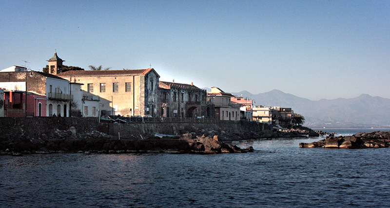 Borgo di Torre Archirafi, Sicily, Italy.